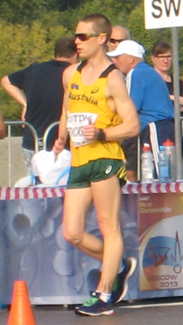 Чемпионат мира по лёгкой атлетике 2013. Ходьба 50 км, мужчины. Пелотон